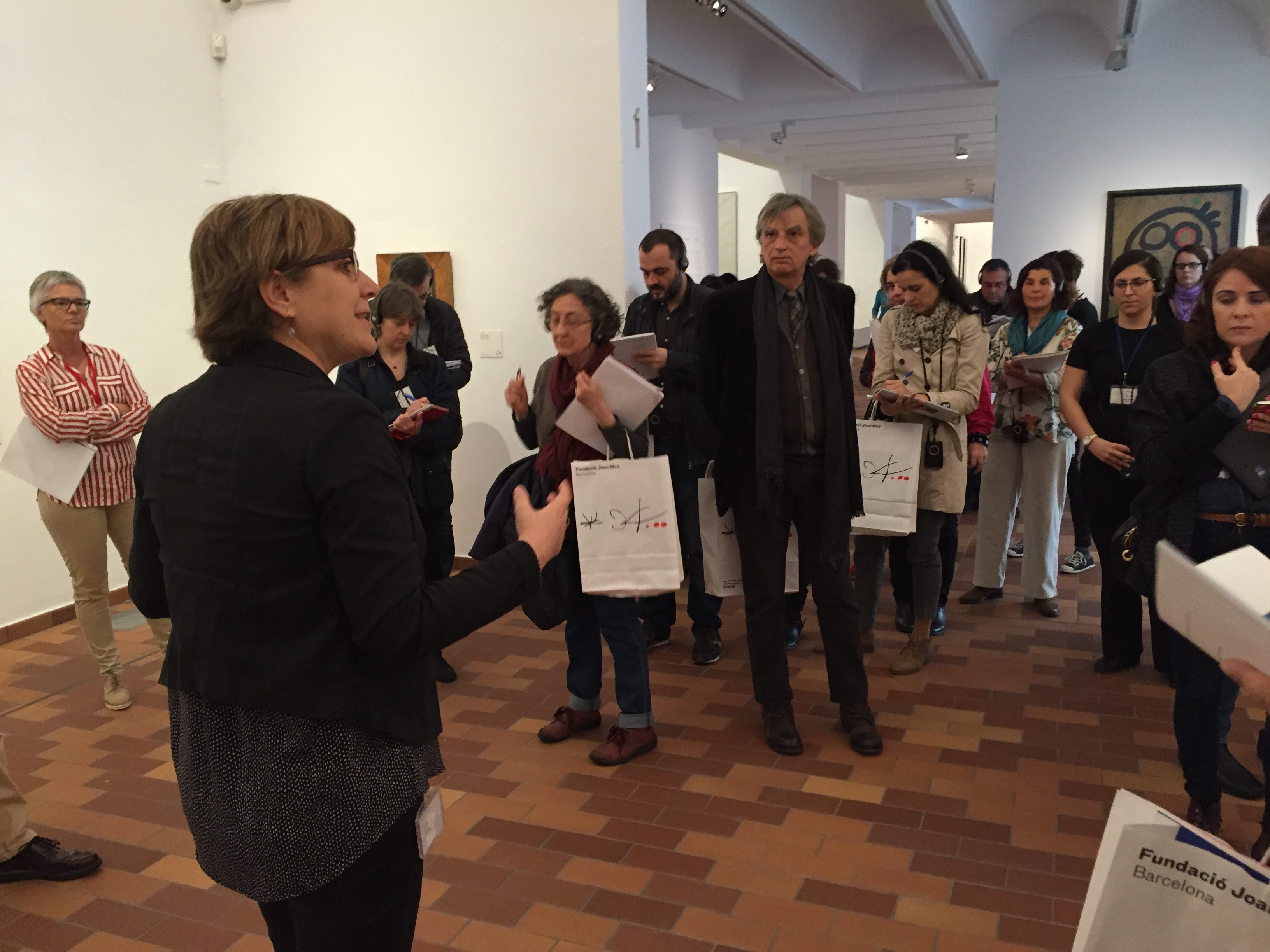 presentació mitjans nova disposició fundació Miró 2016